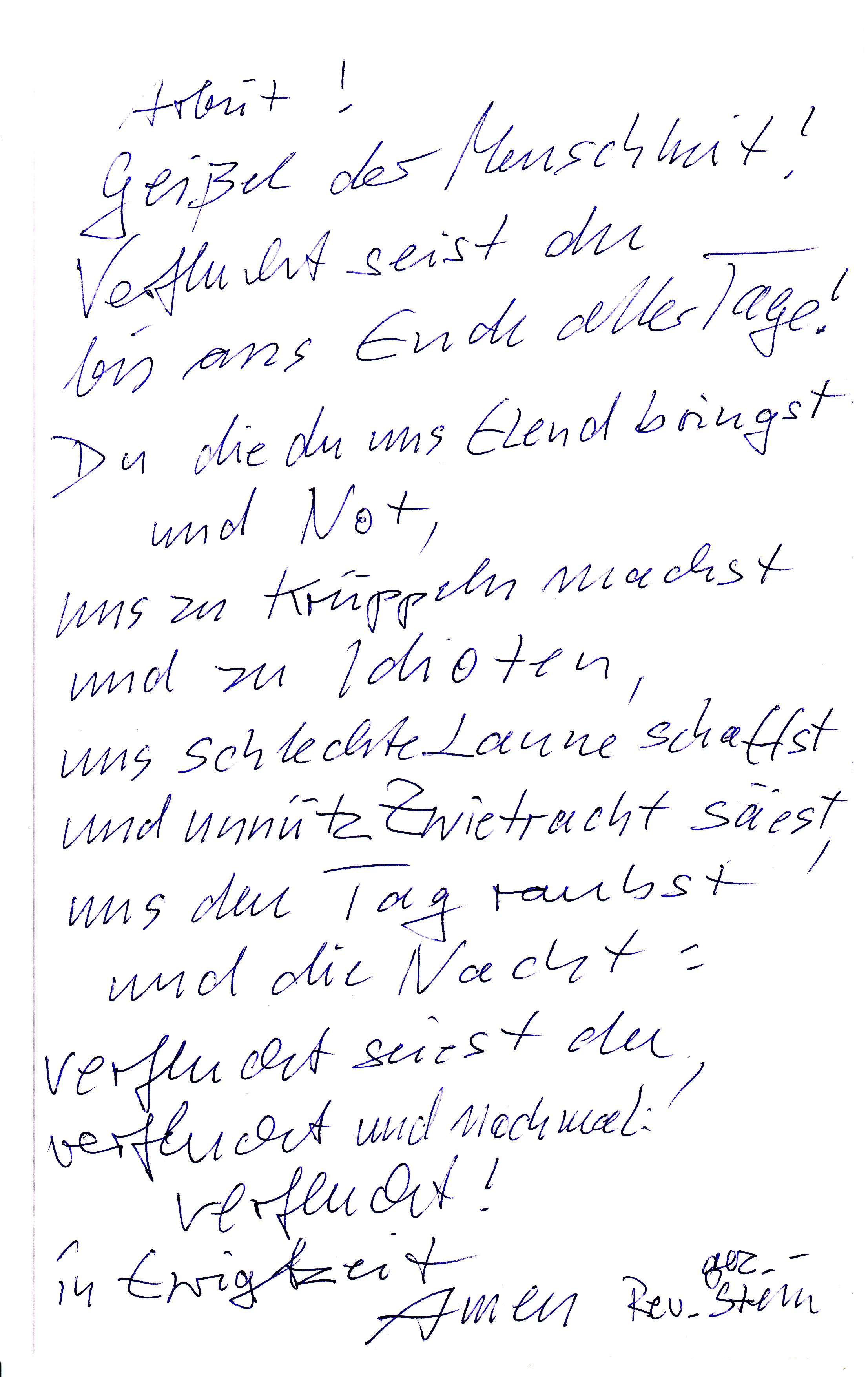 Das Gebet gegen die Arbeit (Handschriftliche Urfassung von Michael Stein)